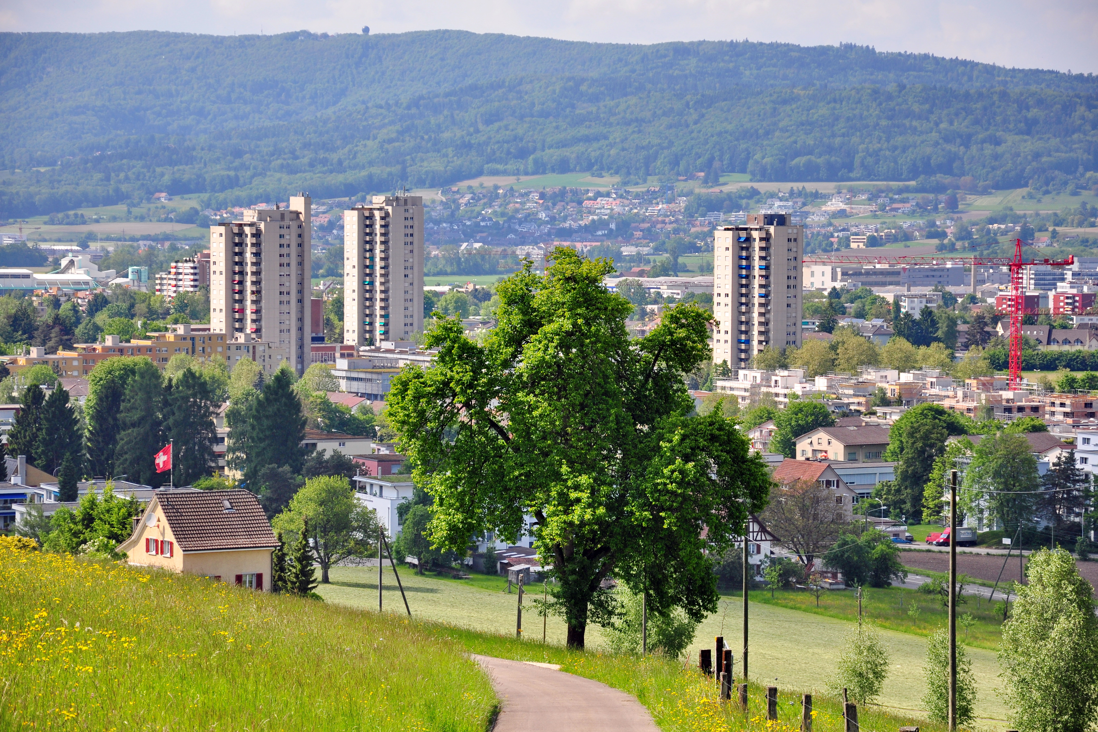 Regensdorf (Switzerland) as seen from Geissberg nearby Gubrist, Lägern in the background.